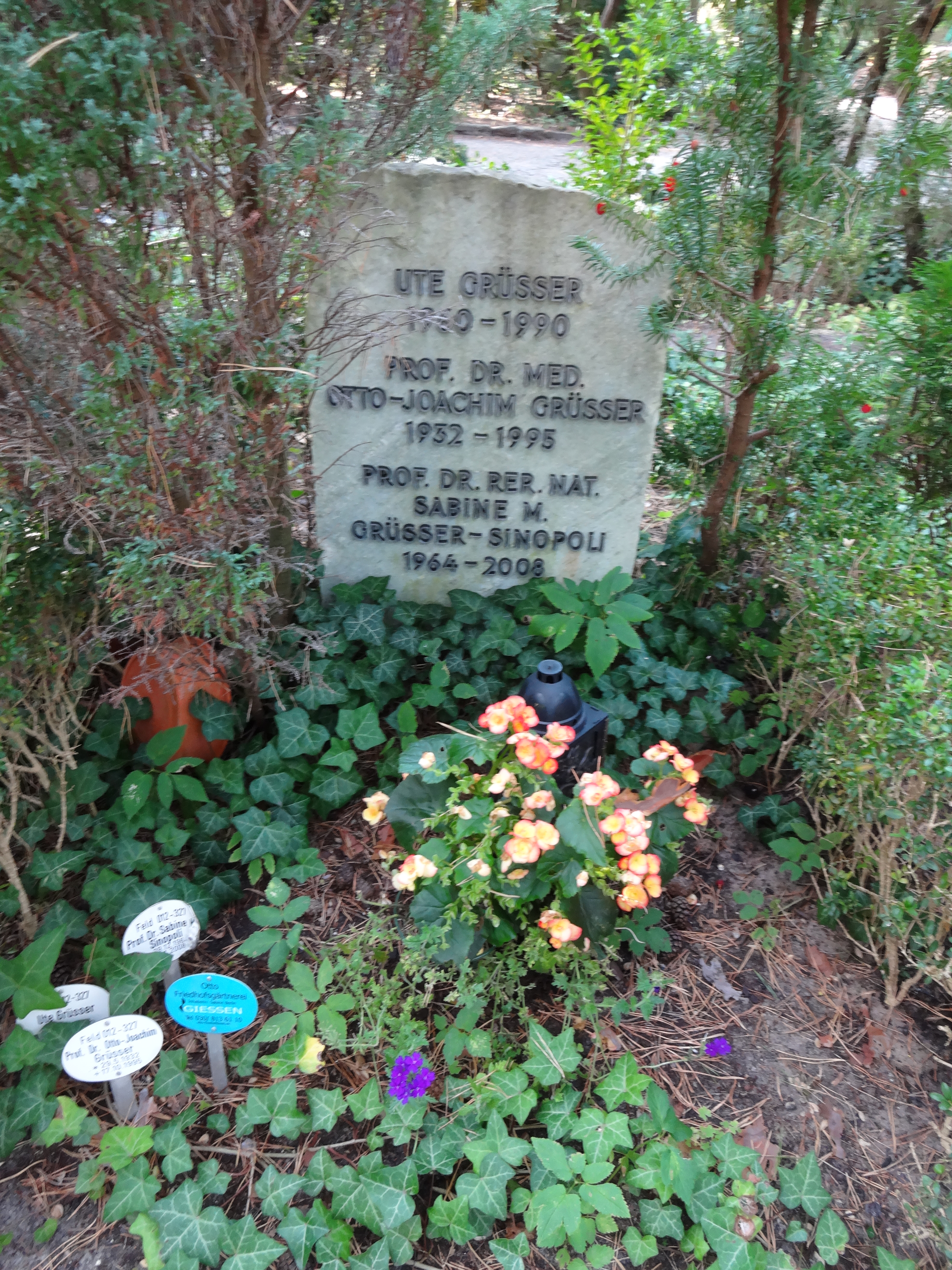 Grab von Prof. Otto-Joachim Grüsser und Prof. Sabine Grüsser-Sinopoli auf dem Waldfriedhof Dahlem